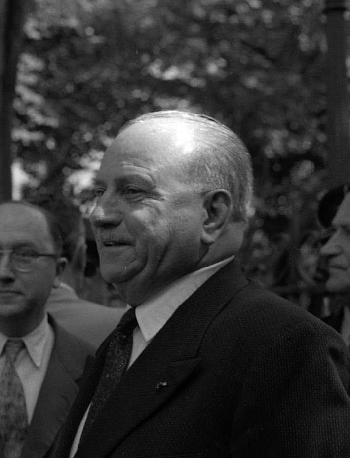 Jardin Royal, devant la statue "A la gloire des équipages pionniers de la ligne France-Amérique". 20 juin 1961. Plan taille de 3/4 face de Didier Daurat, est entouré d'autres personnalités. Cliché pris lors d'une cérémonie d'hommage à la mémoire des pionniers de l'aviation.